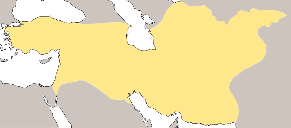 Empèri Pèrs a l'apogèu de Cir II.